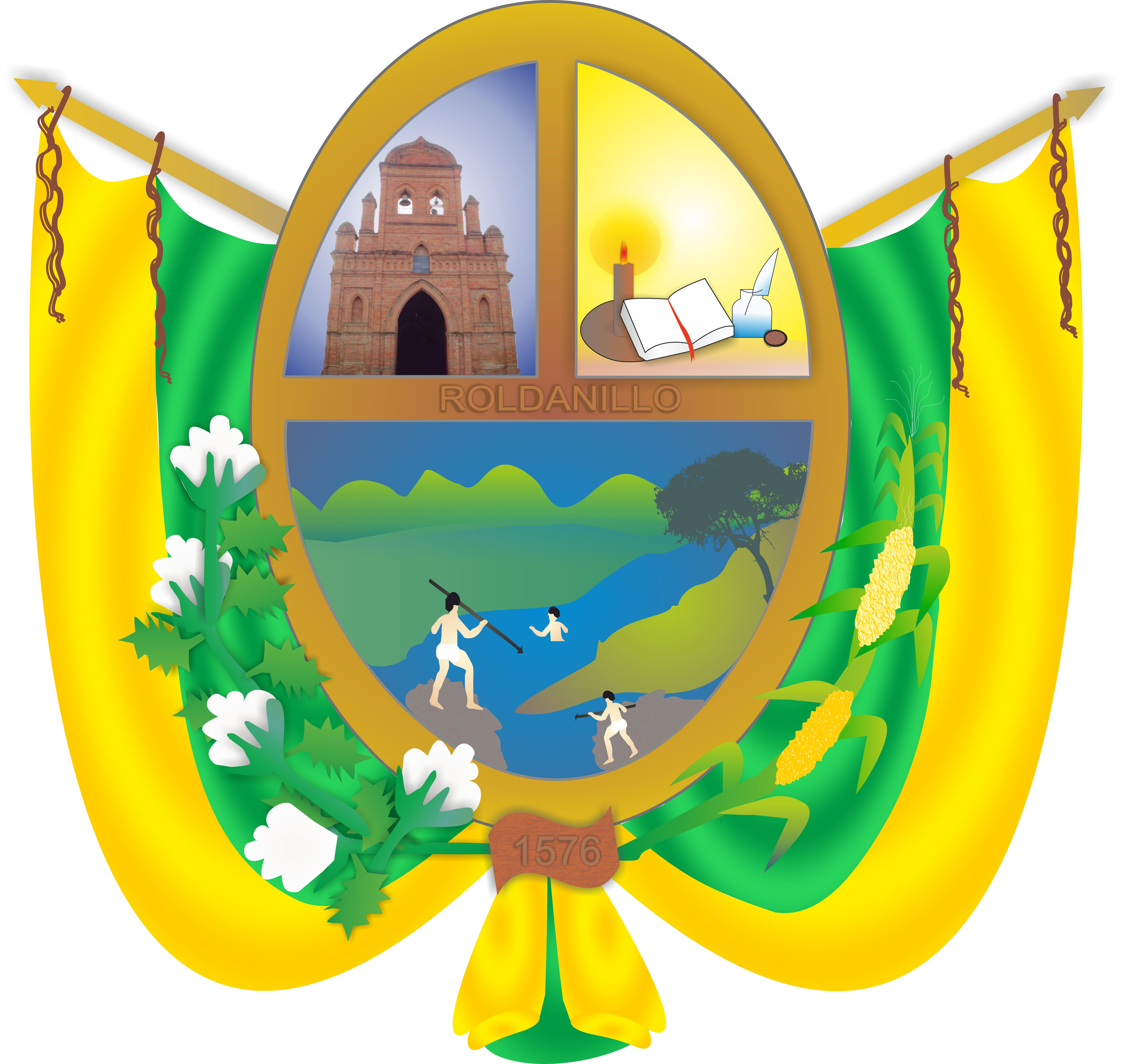 Escudo de la ciudad de Roldanillo (Valle del Cauca, Colombia): En este emblema en el lado superior izquierdo, la histórica iglesia de La Ermita. En el lado superior un libro abierto, una fuente con una pluma y un cirio encendido, símbolos de la sabiduría, la cultura y la inteligencia de las gentes de este pueblo. En la franja inferior contiene un paisaje del pueblo de Roldanillo con sus montañas, el curso de sus dos ríos: Cáceres y Roldanillo; las chozas típicas, árboles y los indígenas parados en las aguas de los ríos a la usanza de la época. En la base del escudo observamos la fecha de fundación y la funda de que portaban los indios para cargar sus armas, el arco y las flechas de caza. A los costados del mismo podemos observar: en el izquierdo una mata de algodón y al derecho una mata de maíz, cultivos característicos de la región; sobre el óvalo en la parte superior; "Tierra del Alma", título dado a Roldanillo por el poeta roldanillense "Carlos Villafañe". En la franja horizontal que divide el óvalo, figura el nombre de Roldanillo, nombre de la ciudad. Bordeando el escudo se encuentra izada la bandera insignia de Roldanillo un amarillo y verde rematando el broche.